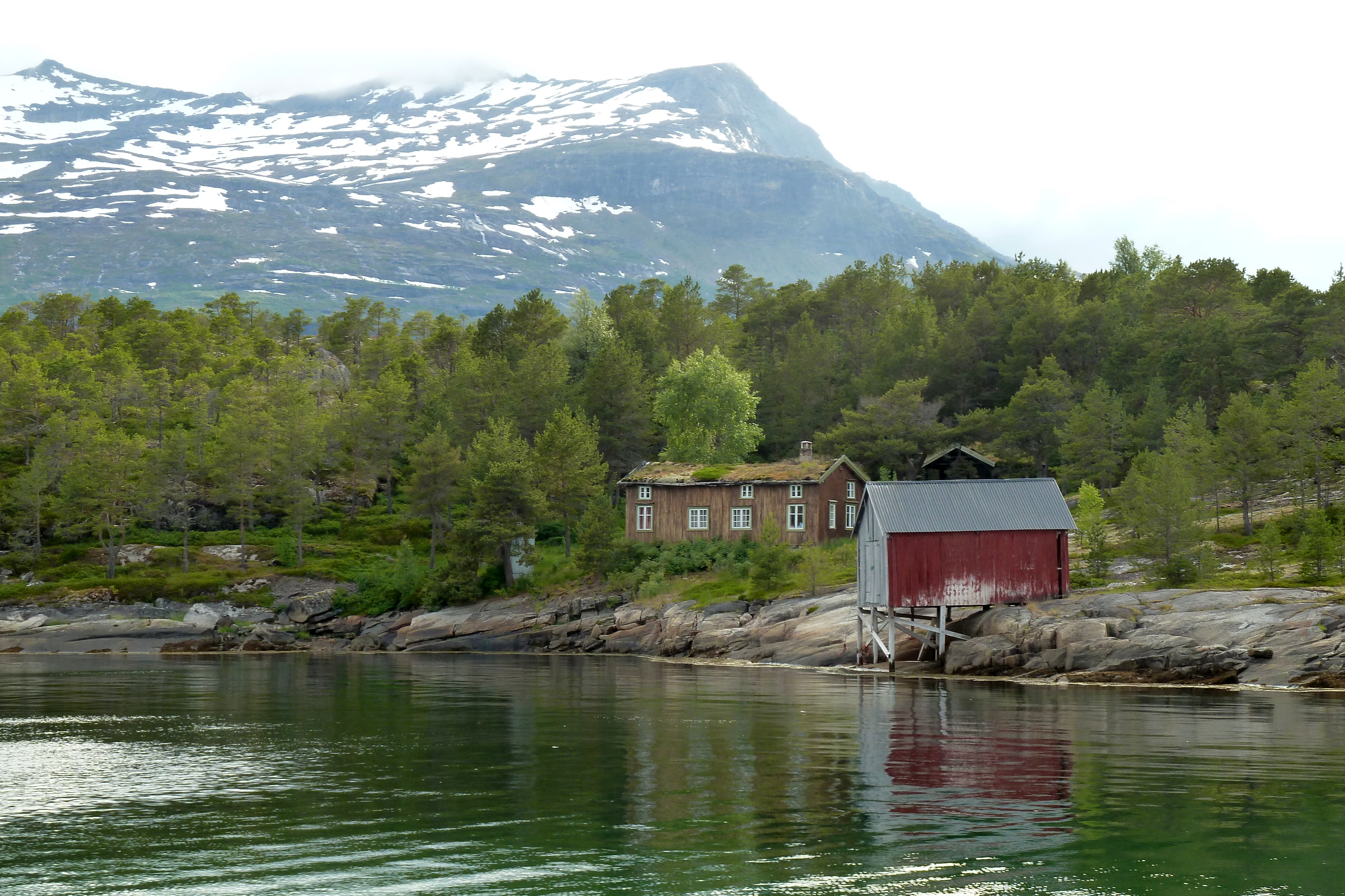 En nedlagt gård på sørøstsiden av Straumsnesøya ved Innhavet i Hamarøy.